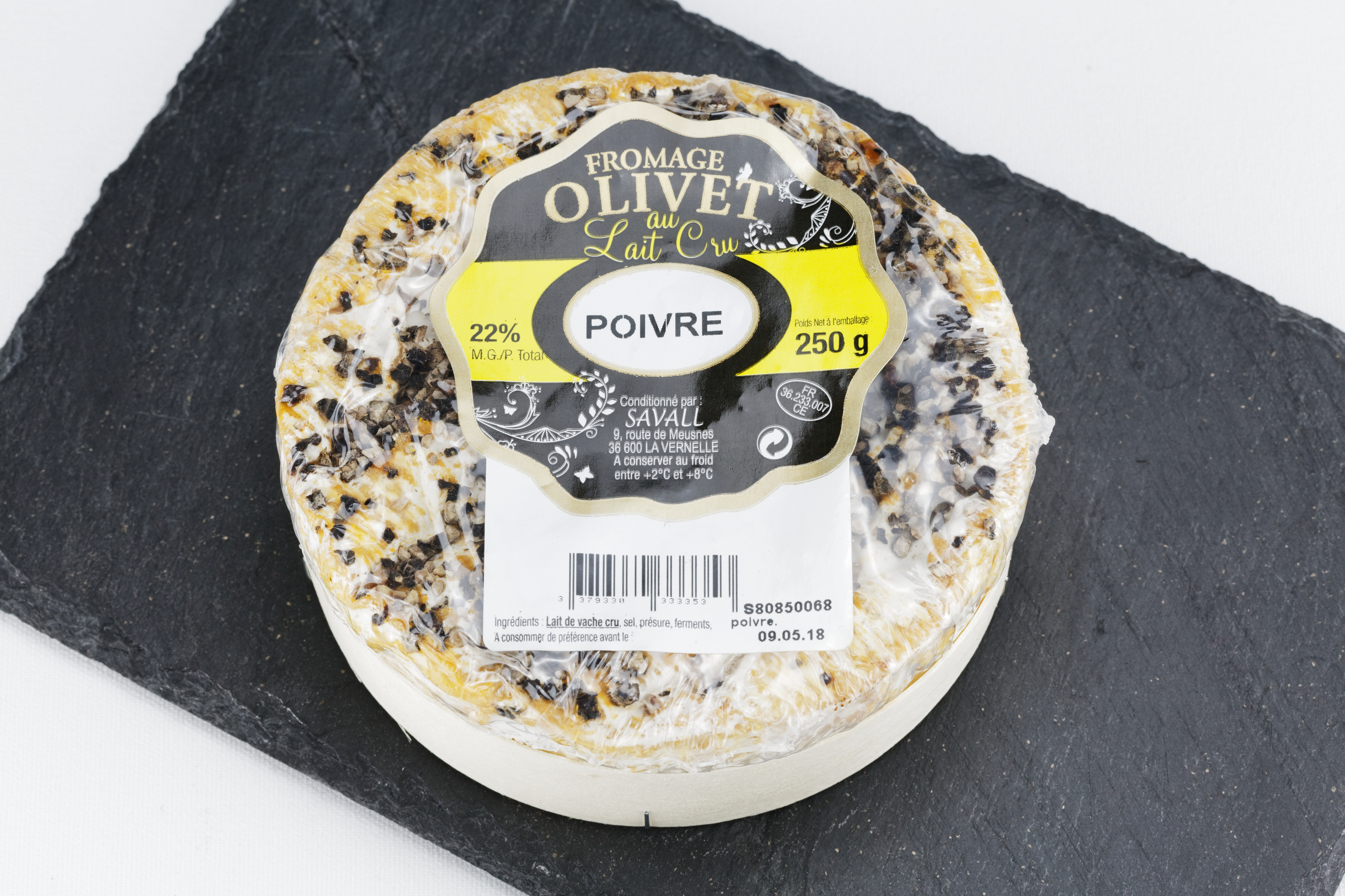 L'olivet est un fromage au lait de vache, ici du lait cru et recouvert de poivre, produit en région Centre.